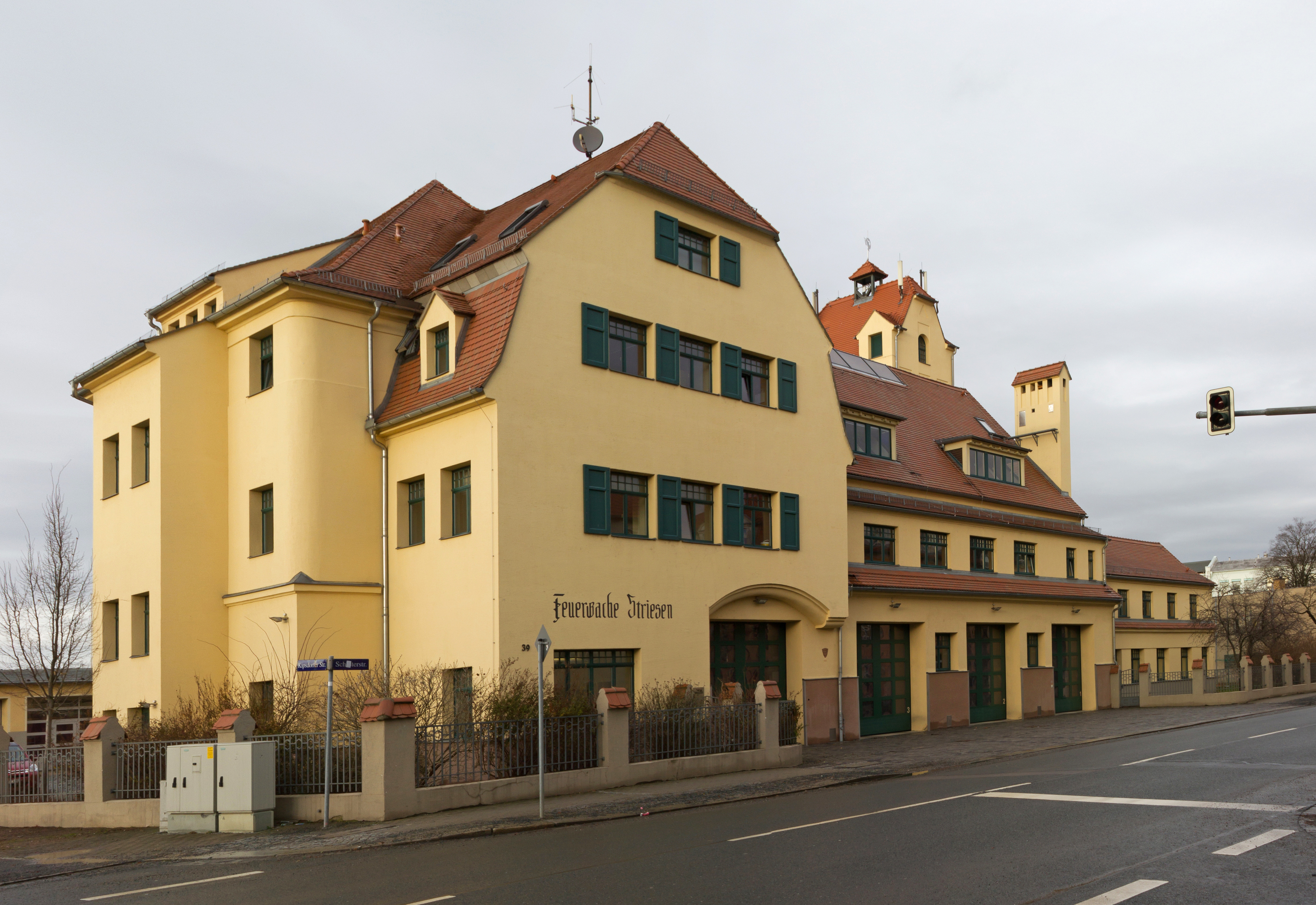 Feuerwache in Dresden-Striesen. Architekt Hans Erlwein.